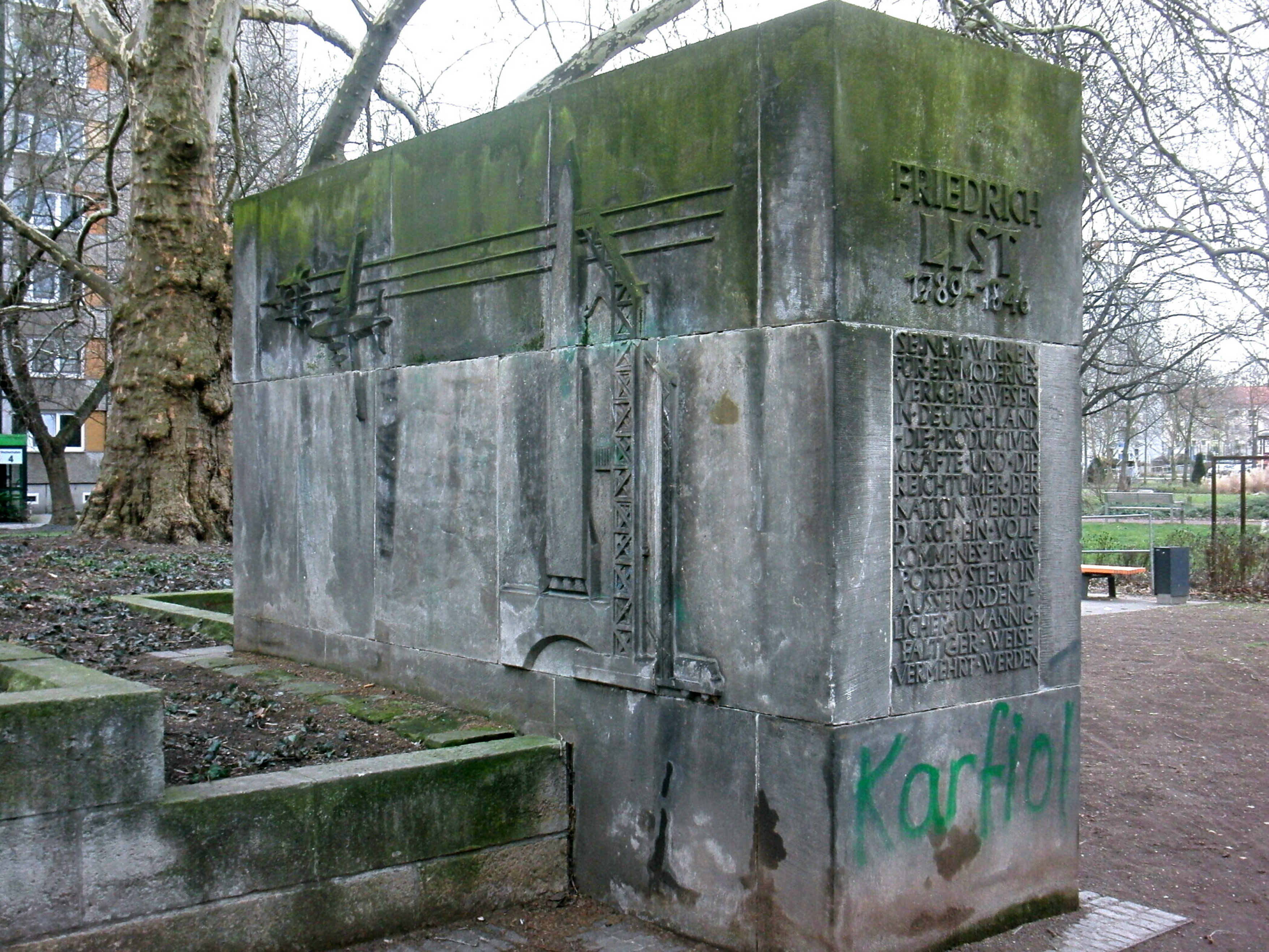 Friedrich List Denkmal in Dresden vom Bildhauer Wilhelm Landgraf 1964